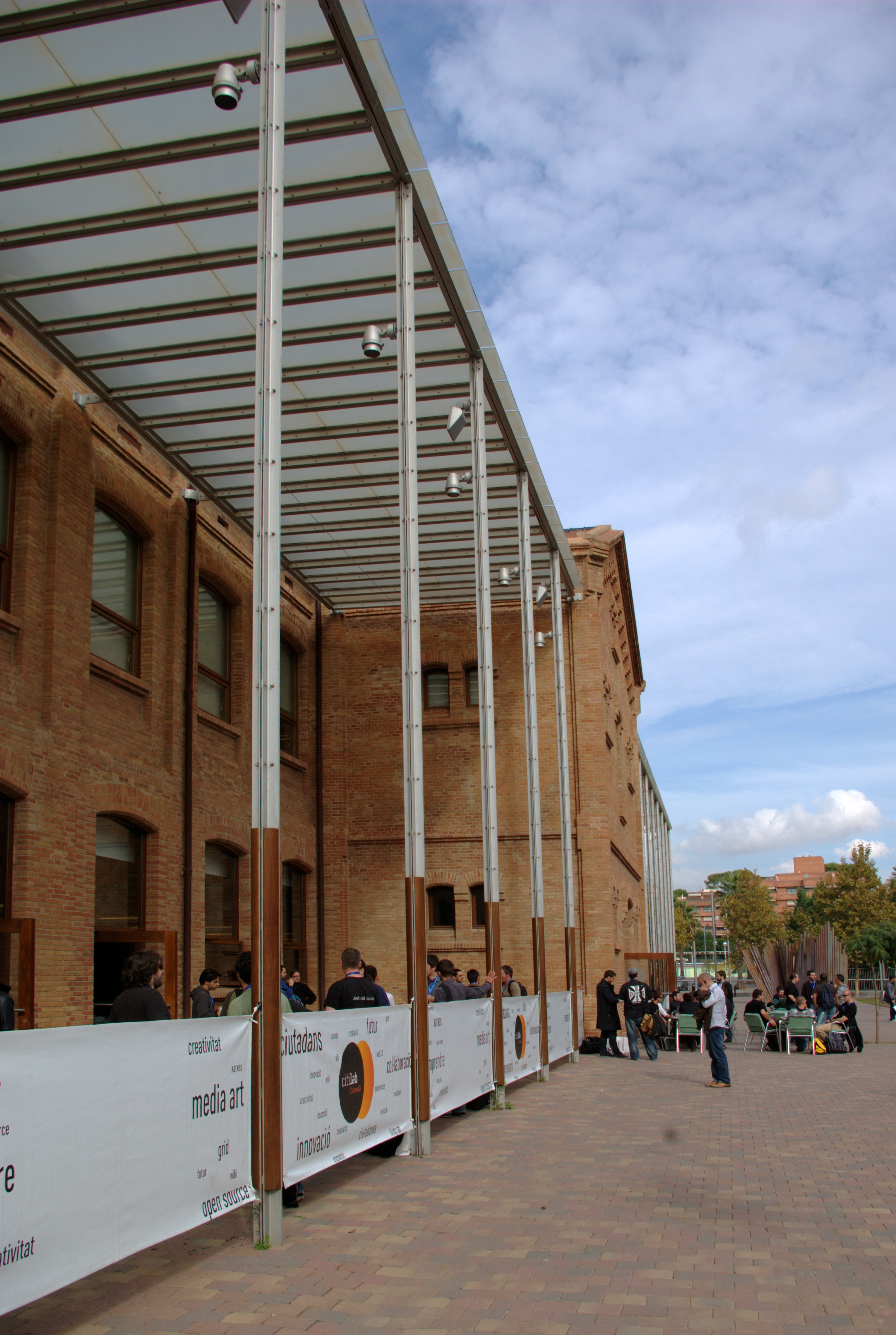 primer laboratorio ciudadano digital de Europa. Citilab en Cornellá